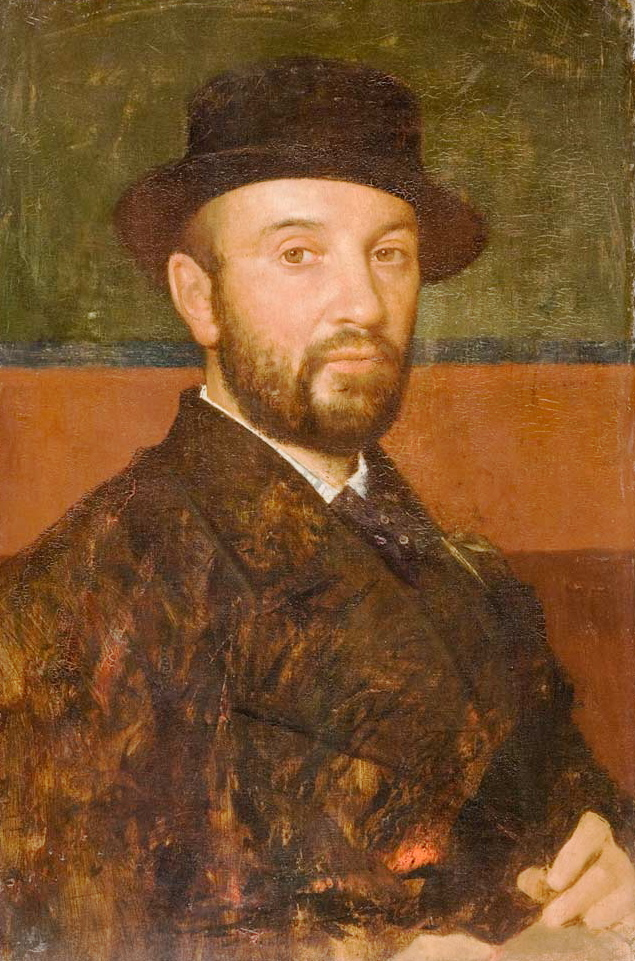 Autoportrait de Jules-Élie Delaunay.